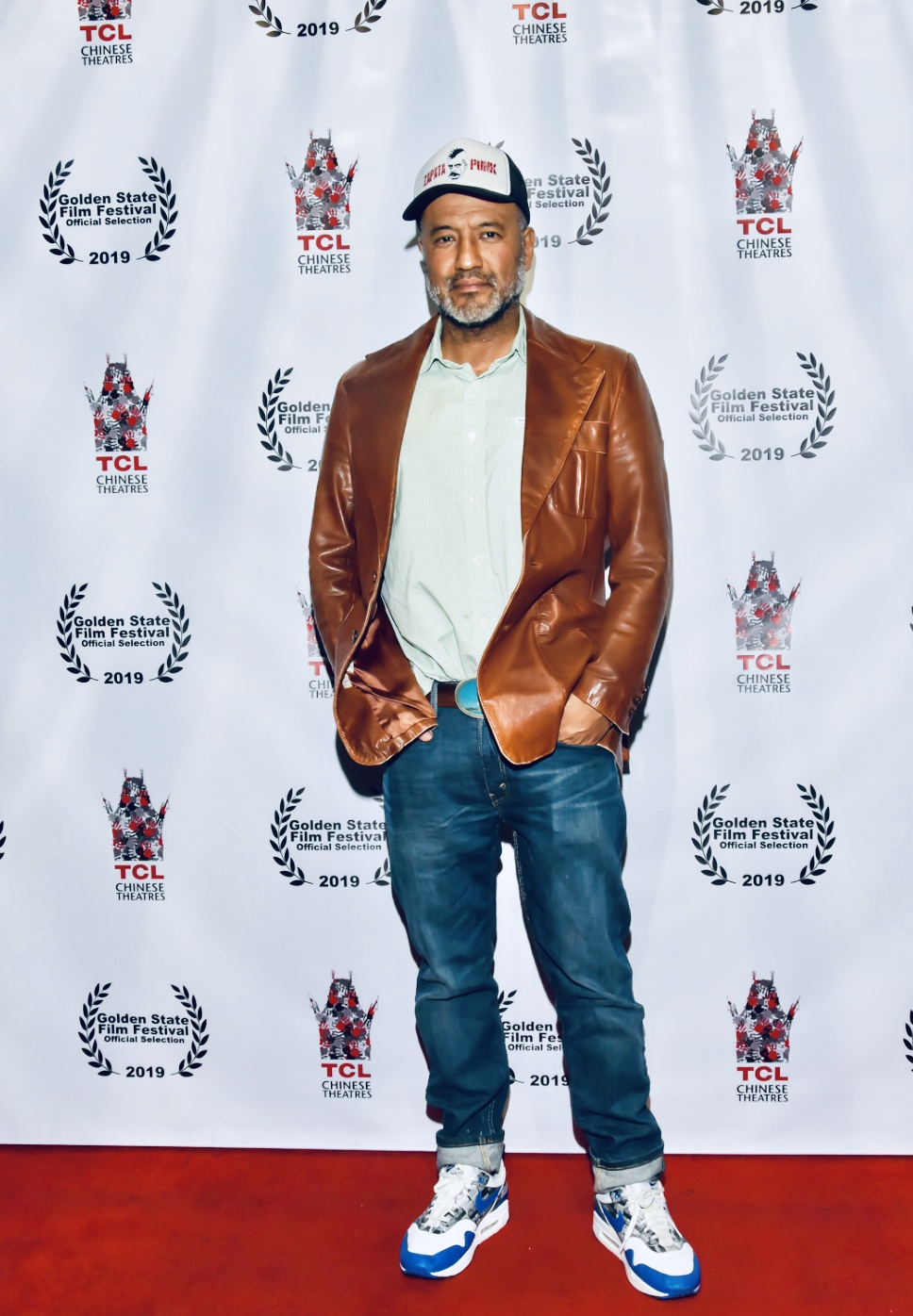 Juan Escobedo at the Golden State Film Festival